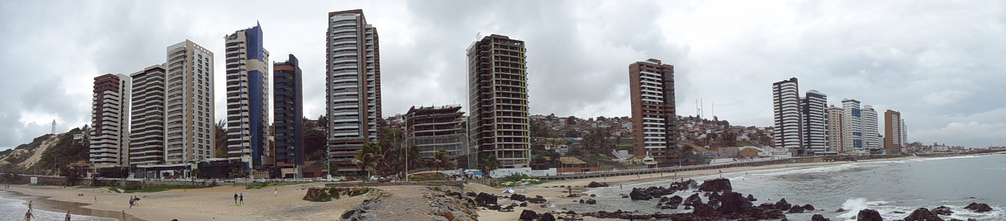 Orla de Natal, RN, Brasil.